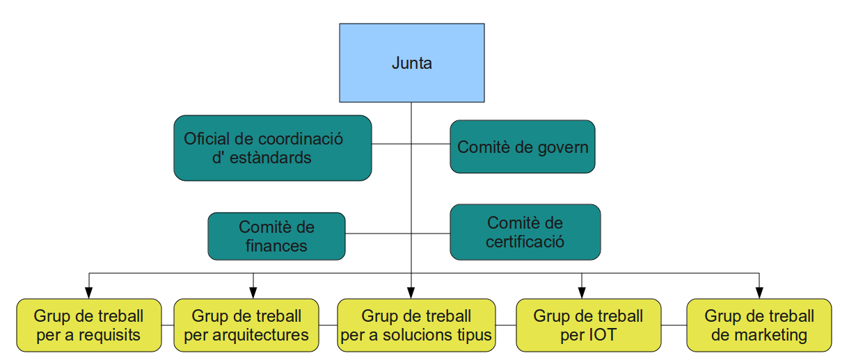 Diagrama de blocs de la organització de l'Open IPTV Forum. Versió en català.